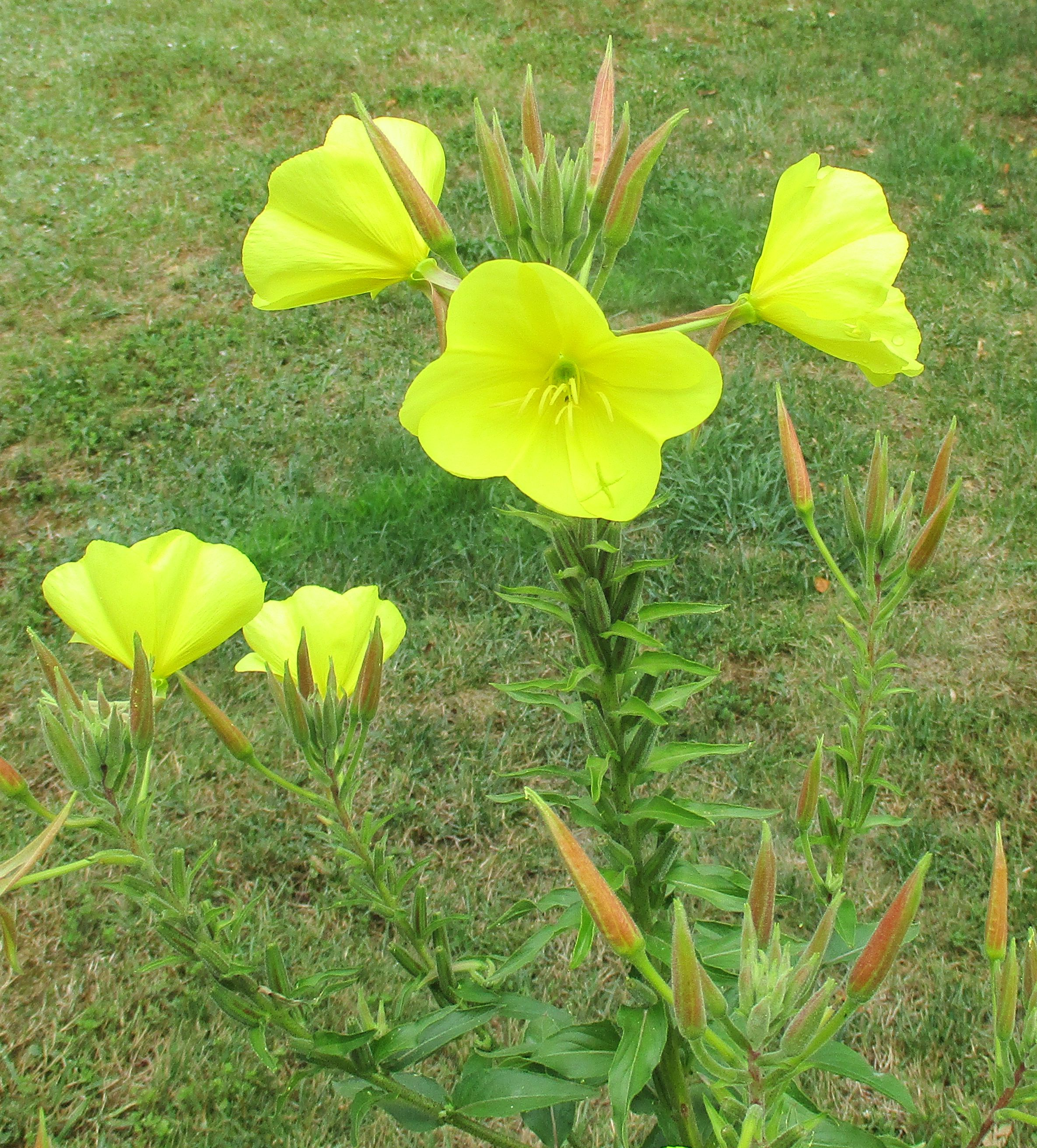 Gemeine Nachtkerze (Oenothera biennis), 9.7.2020 Frankfurt